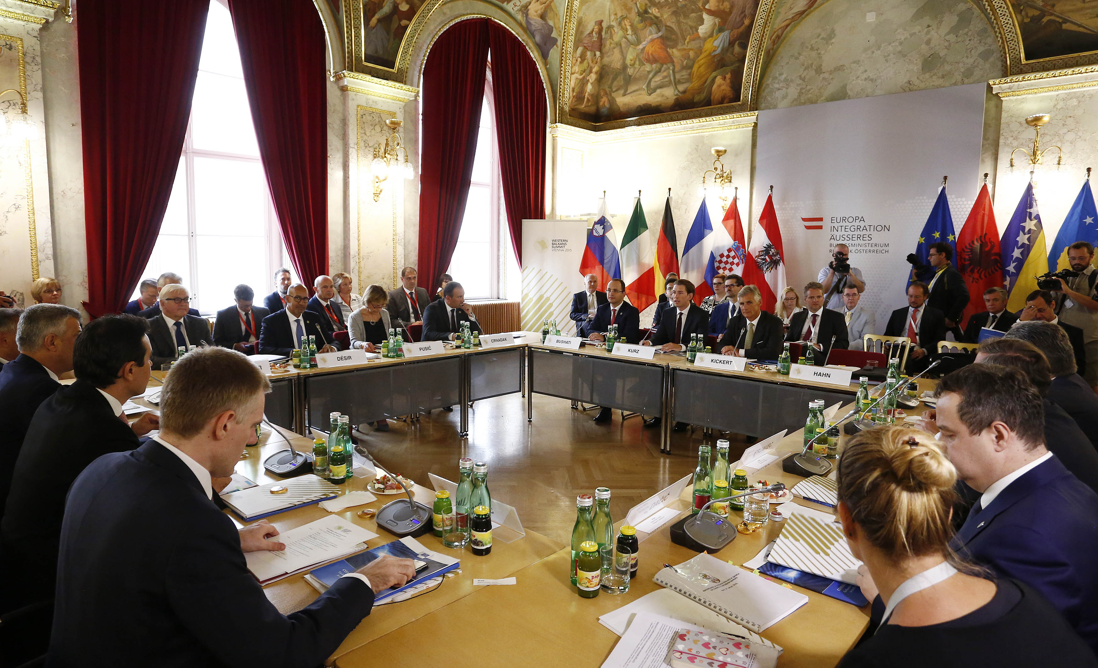 Eröffnung der Außenministerkonferenz im Rahmen der Westbalkankonferenz durch BM Sebastian Kurz. Wien. 27.08.2015, Foto: Dragan Tatic